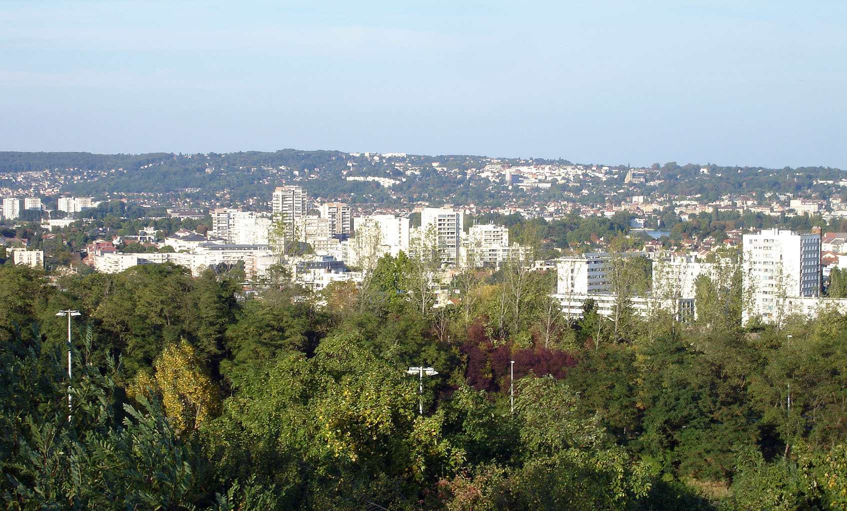 Vue générale de Saint-Gratien depuis la colline d'Orgemont, Val-d'Oise, France. Au fond, Montmorency sur sa colline ; à droite, le lac d'Enghien.